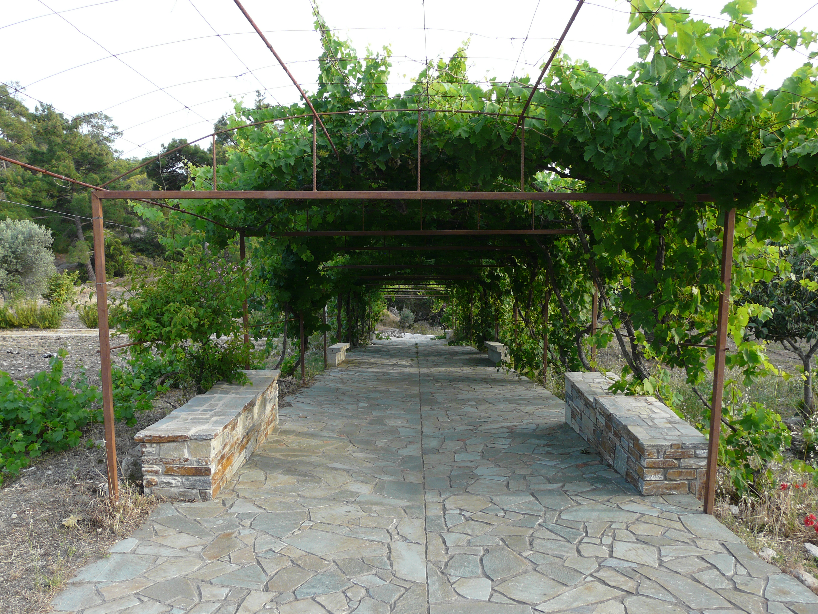 Moni Tharri (monastery), Laerma village